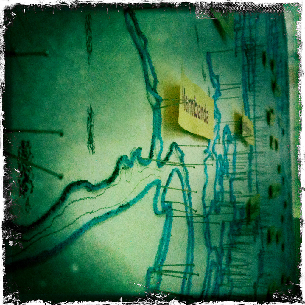 SUD Salon Urbain de Douala 2010